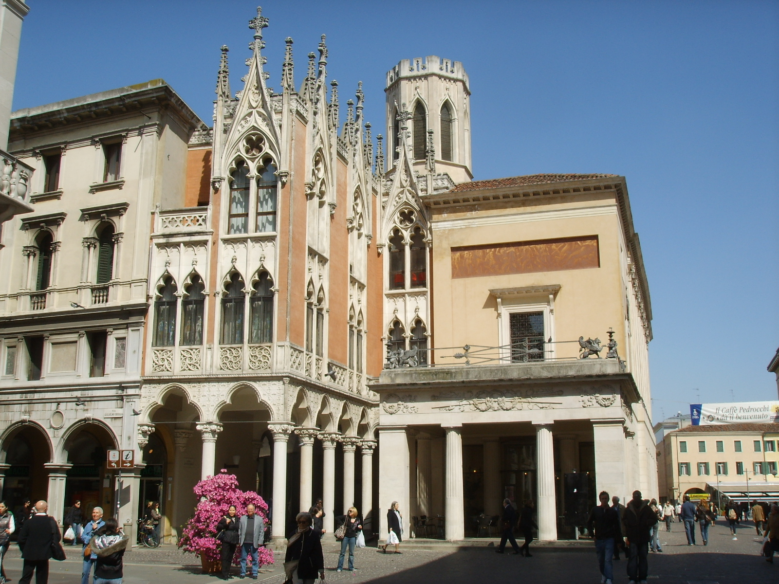 Padova, caffé pedrocchi